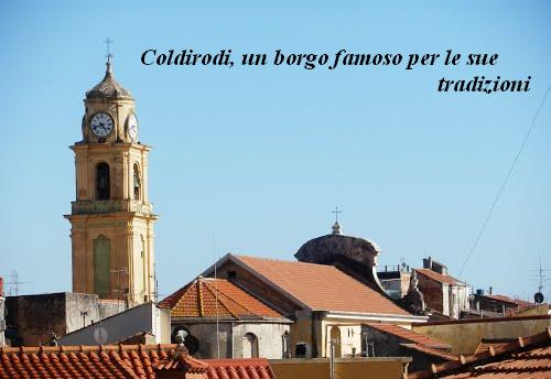 Coldirodi, un borgo famoso per le sue tradizioni.